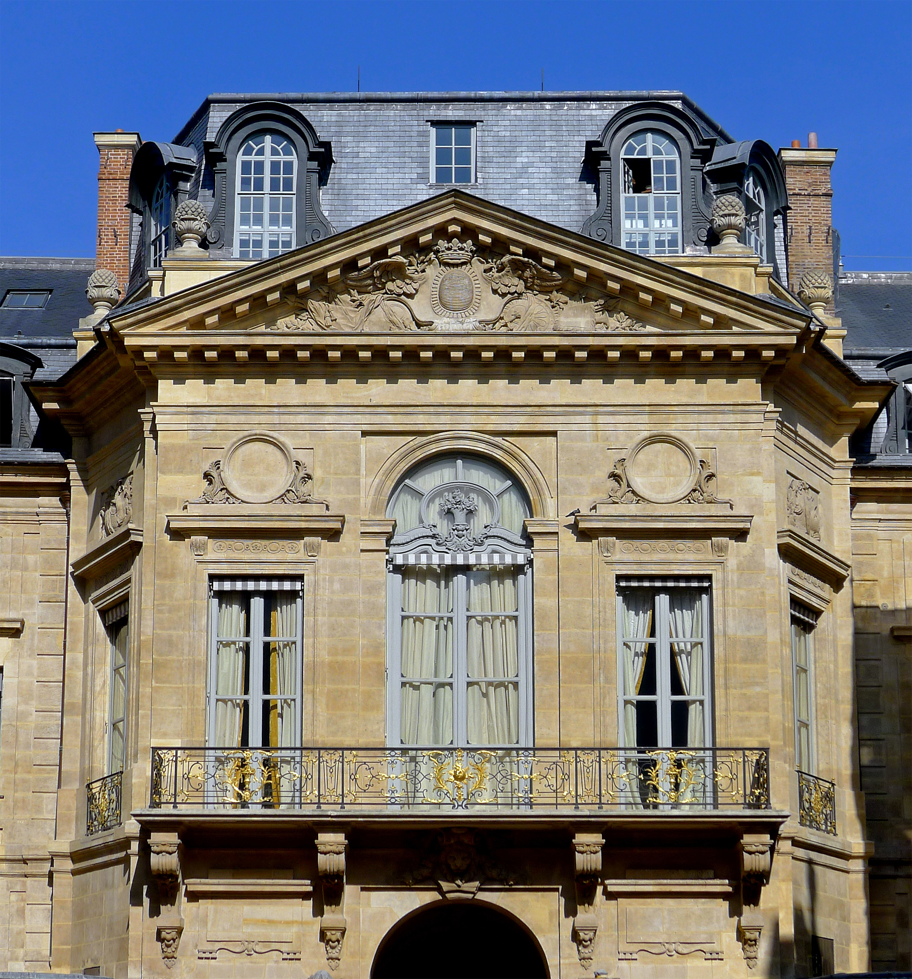 Palais-Royal (Classé), pavillon côté rue de Valois - Paris Ier .